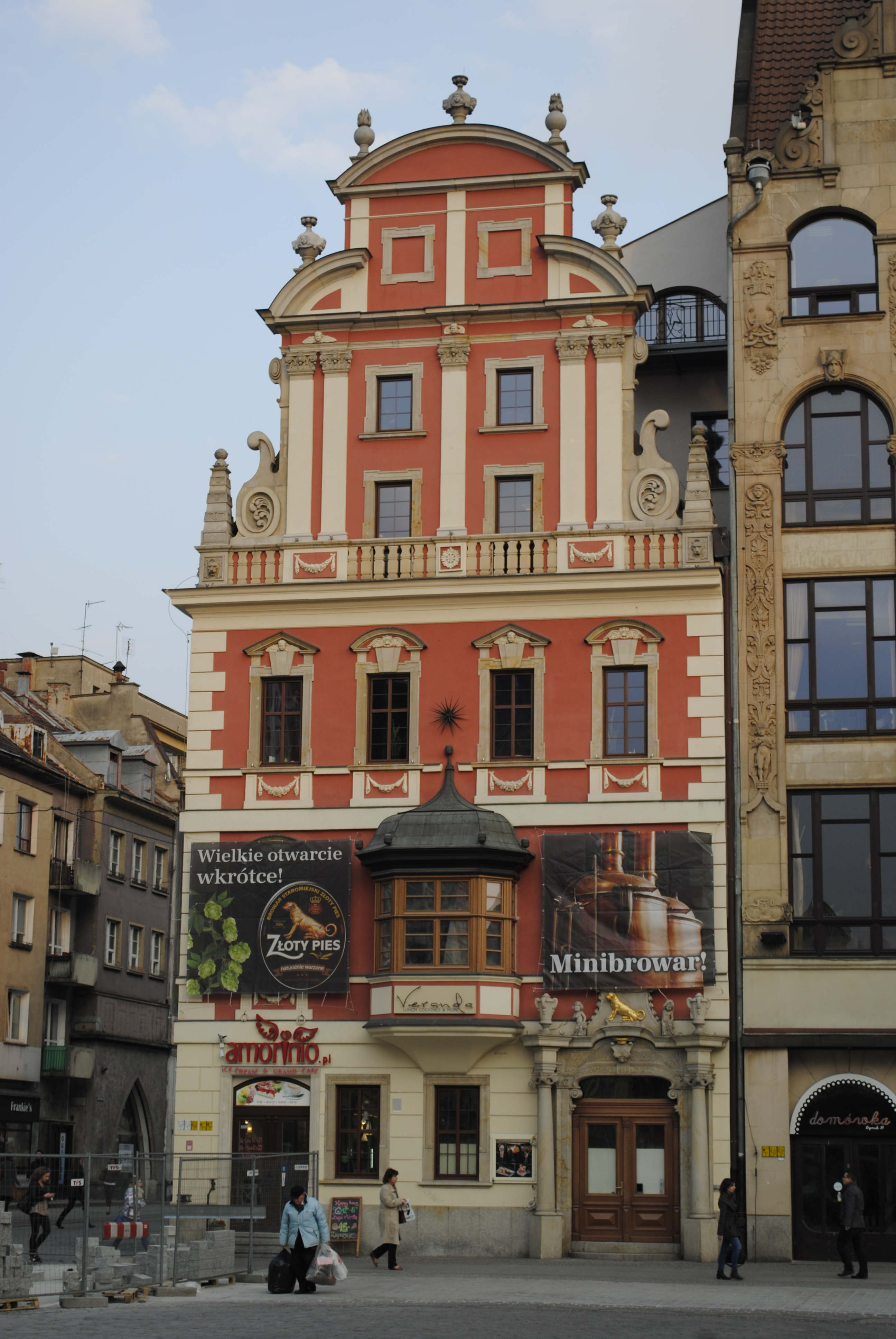 Haus zum goldenen Hund am Großen Ring in Breslau